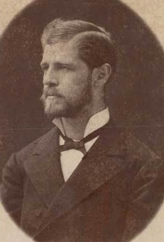 German Riesco